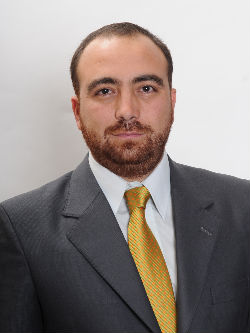 Fuad Eduardo Chahin Valenzuela